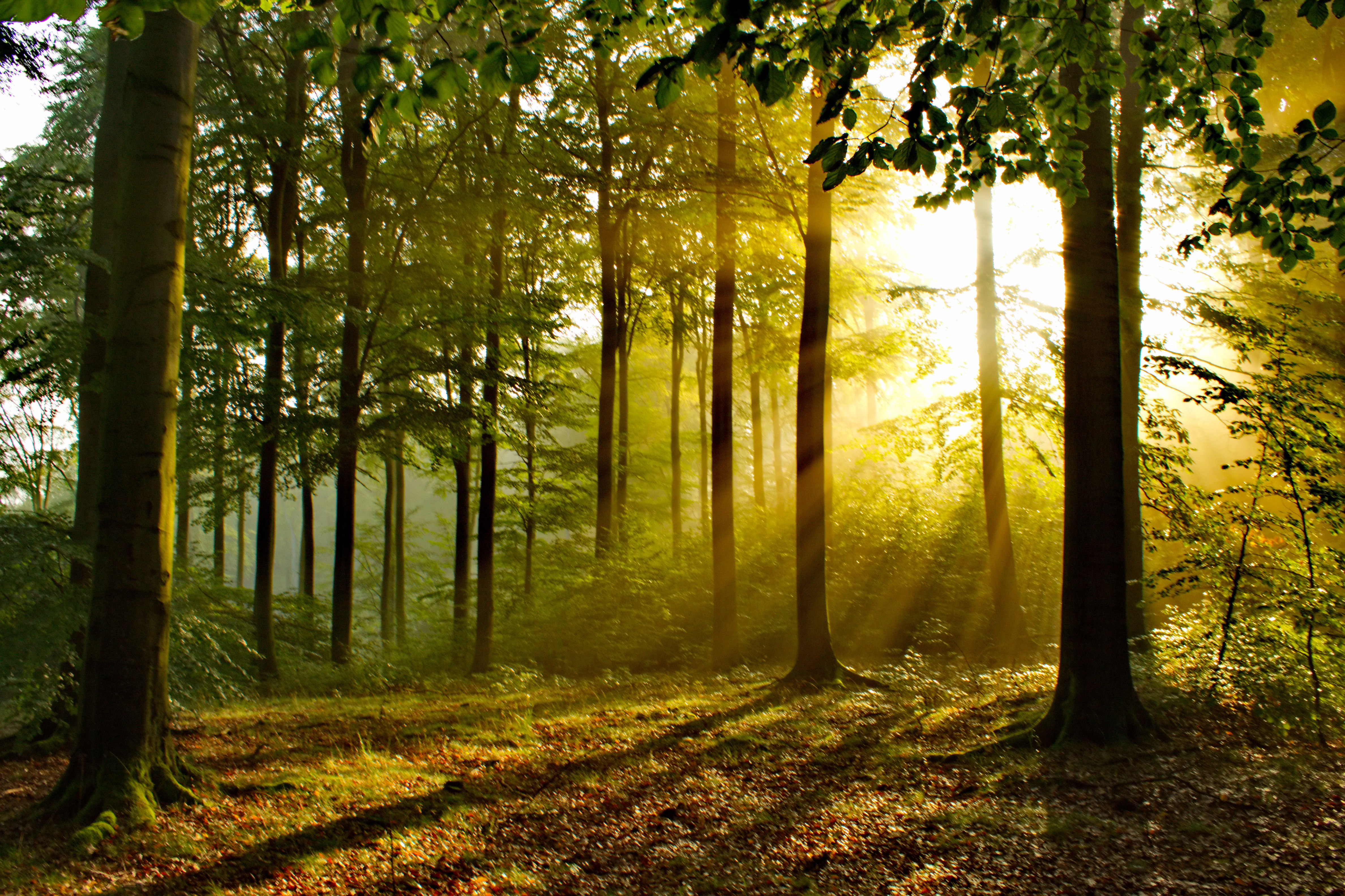 Sonnenaufgang im Arnsberger Wald im Stadtgebiet von Arnsberg, Bereich im Landschaftsschutzgebiet „Arnsberg“ (LSG 4513-001), NRW